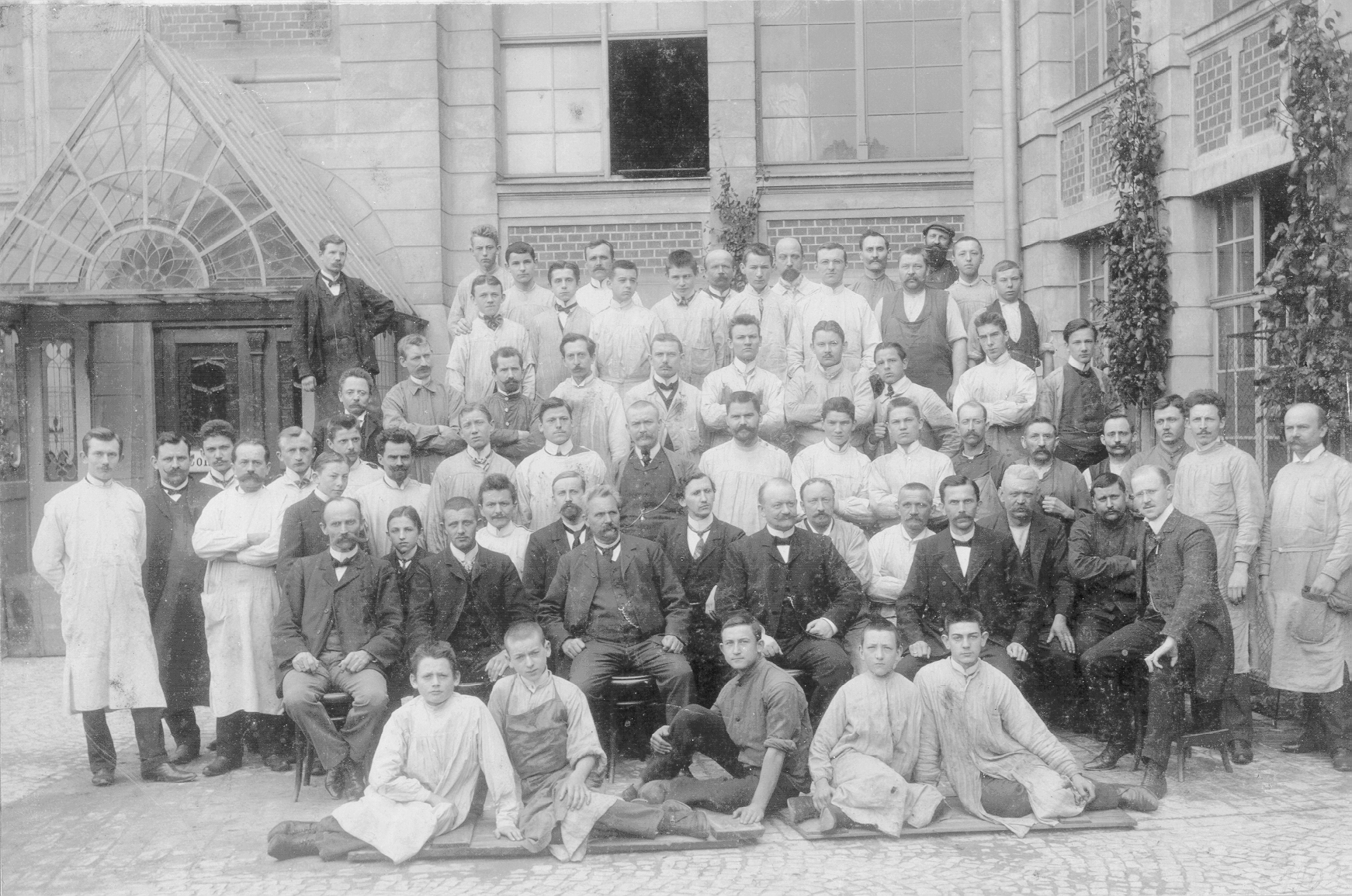 Belegschaft der Glasmalereimanufaktur Ferdinand Müller, Quedlinburg 1908